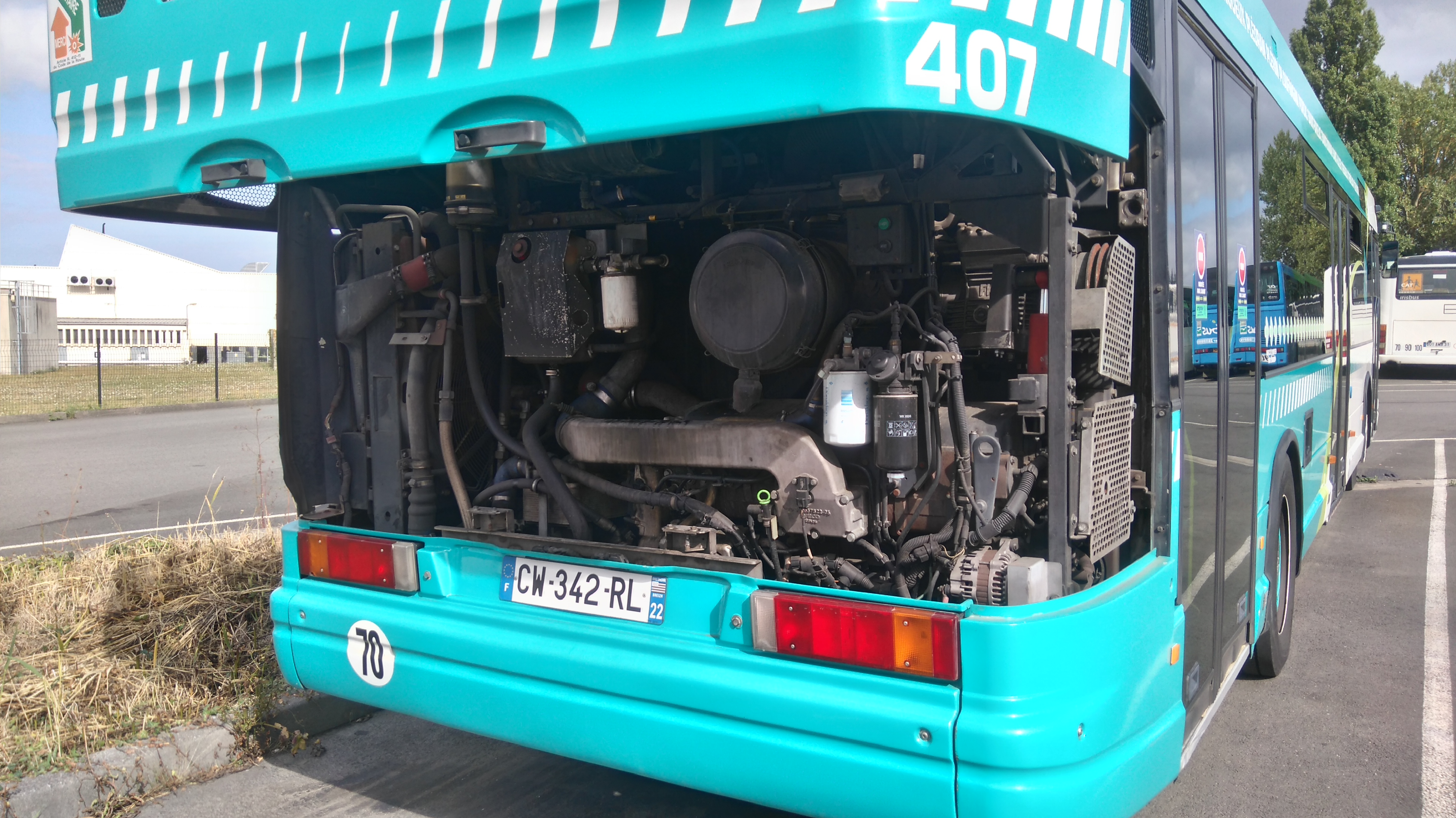 Heuliez GX 317 - TUB - Moteur